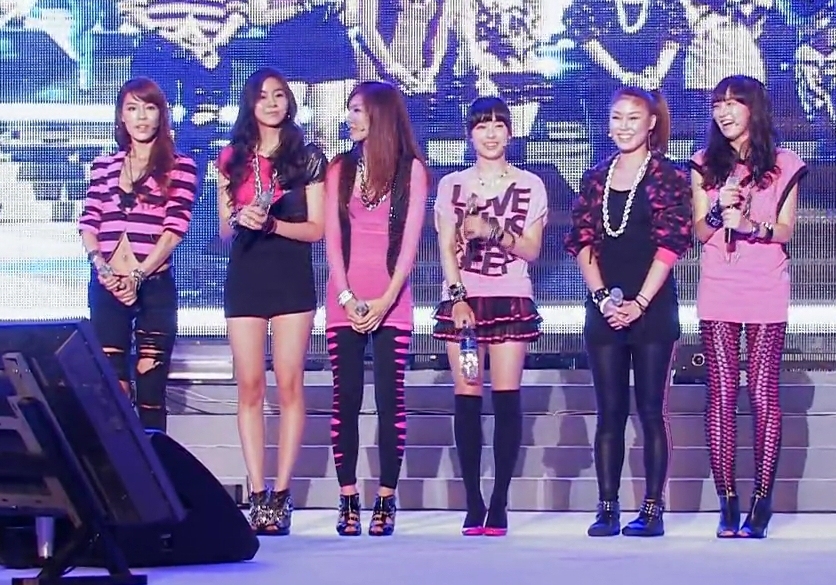 2009년 7월 19일 애프터스쿨, 던전앤파이터 페스티벌에서